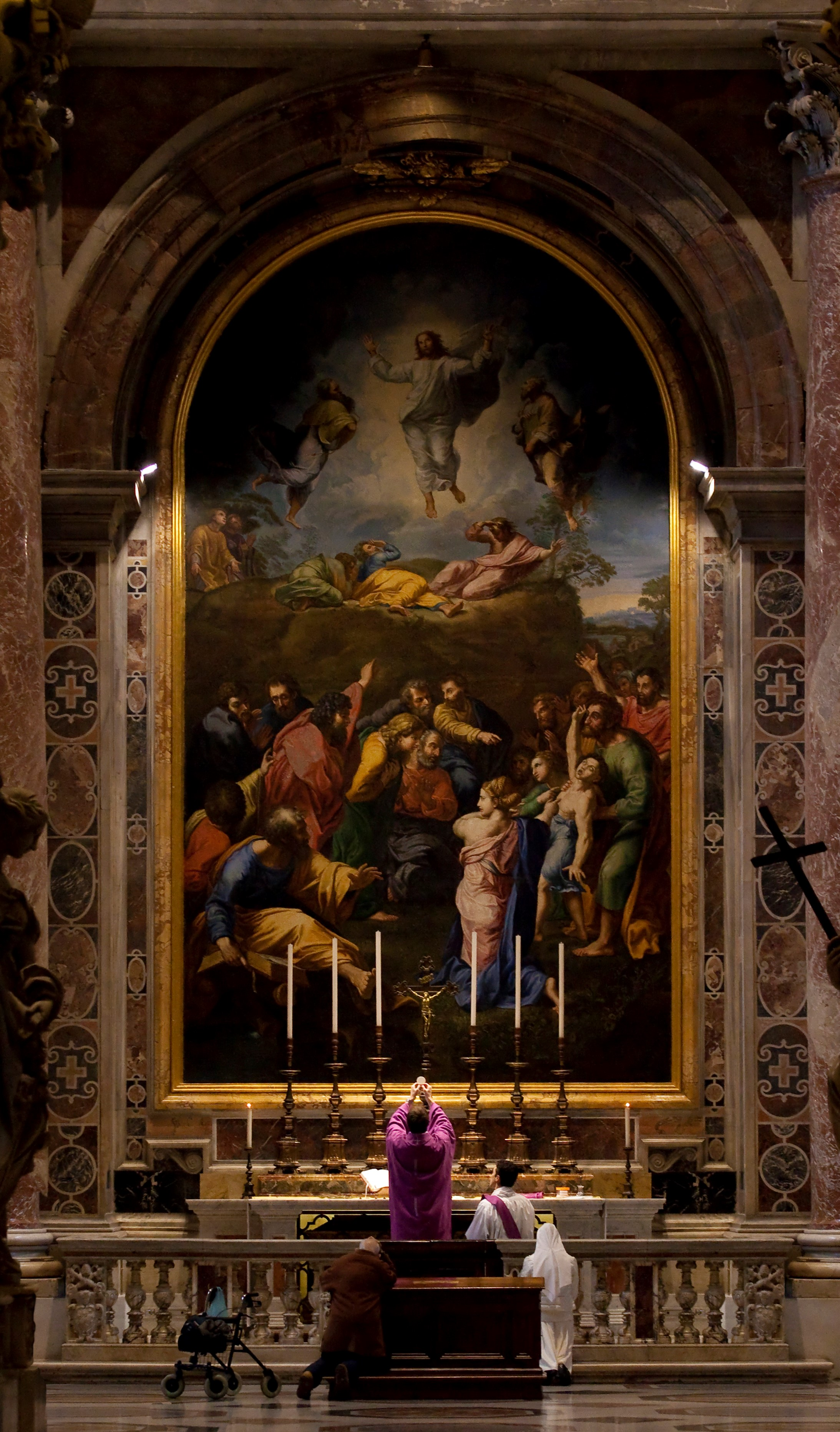 Transfiguration als Mosaik in St. Peter, Rom